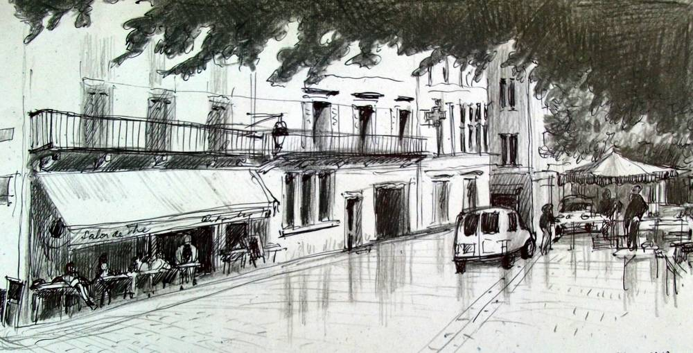 Croquis au stylo à bille et au crayon 6B du côté nord de la place du Coderc (Périgueux, Dordogne).